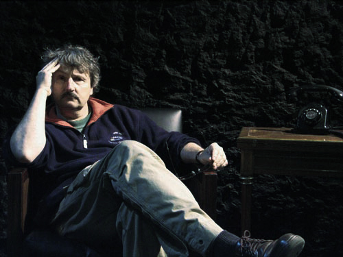 photographie du cinéaste Jean-François Amiguet